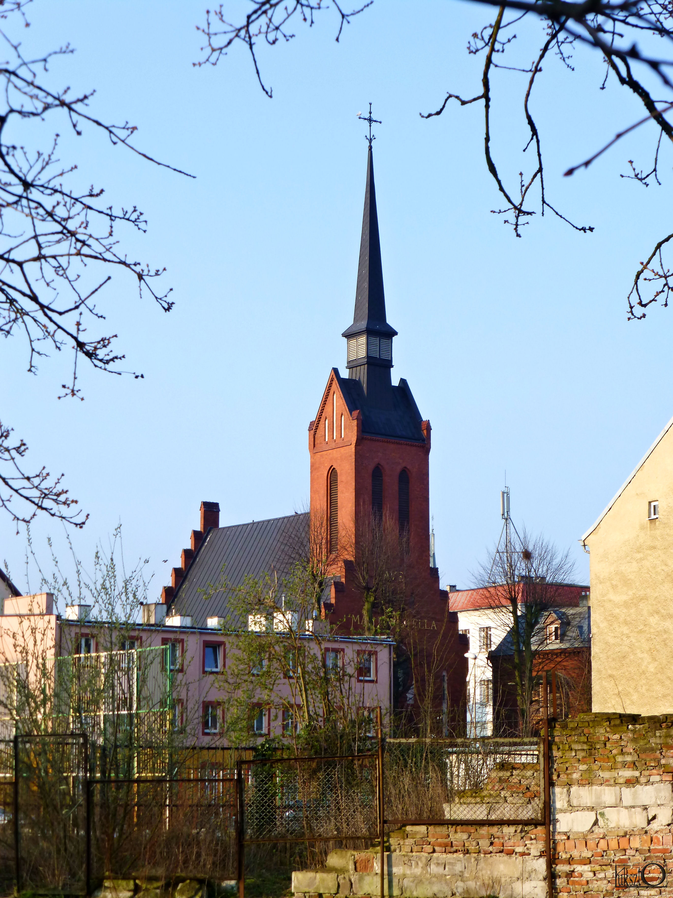 Świnoujście - Kościół NMP Stella Maris